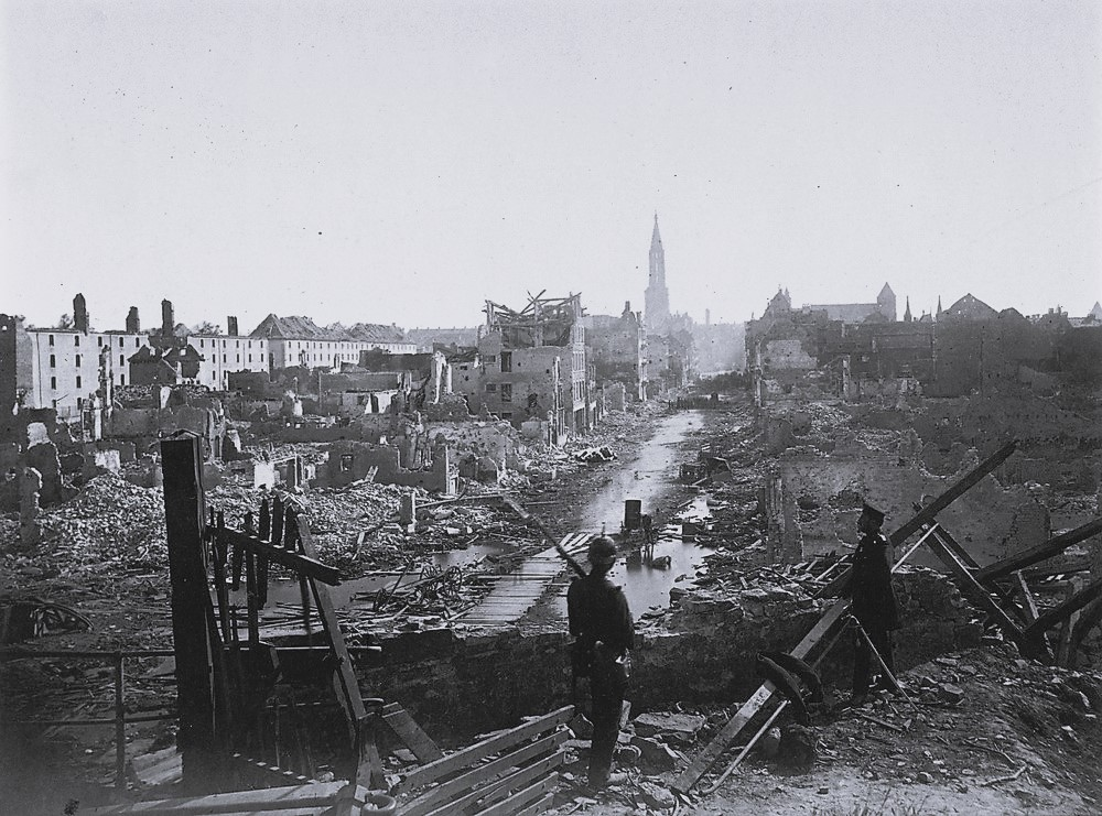 Deutsch-Französischer Krieg, Belagerung von Straßburg, Straßburg vom Steintor aus, 28. September 1870